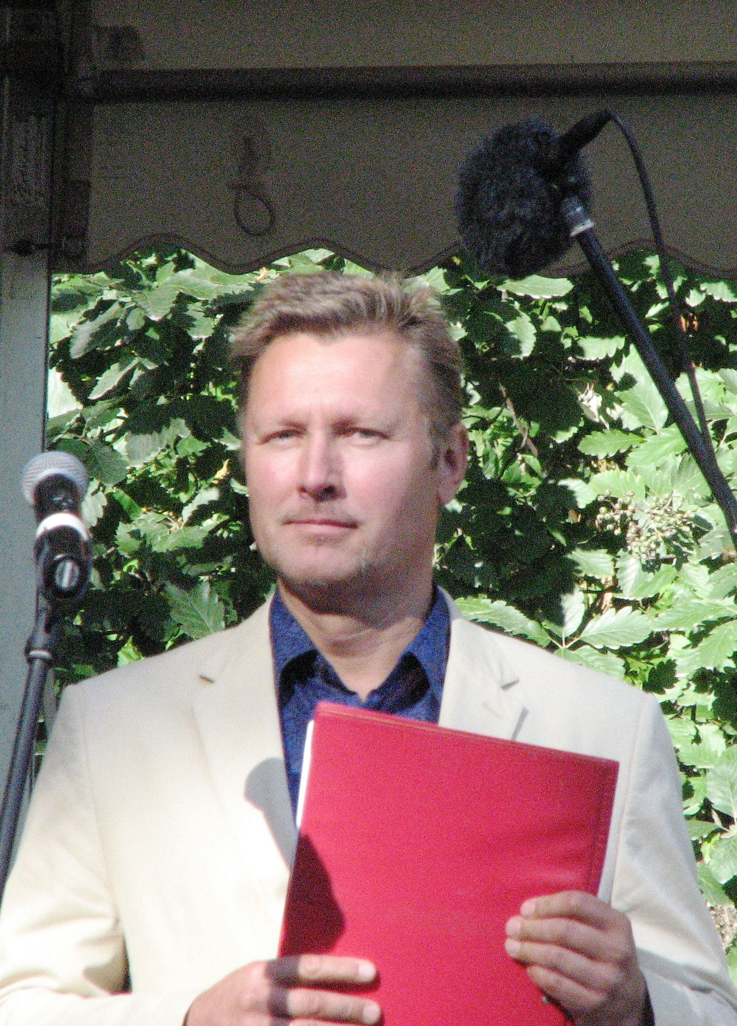 Aare Saal esinemas Saaremaa Ooperipäevade avakontserdil "Kuressaare 450"